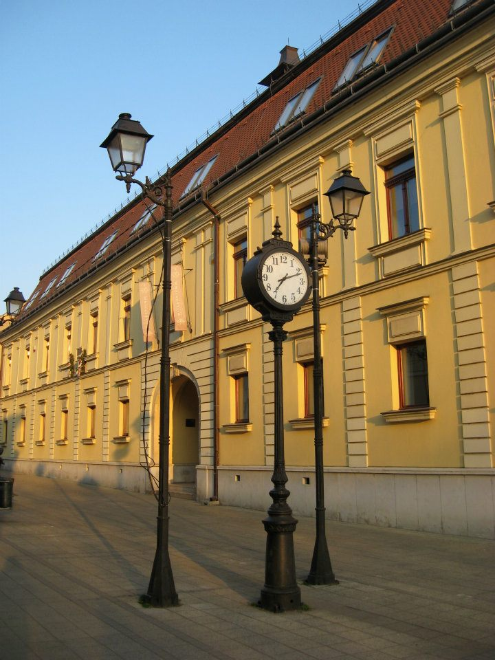 Hanul "Vulturul Negru"